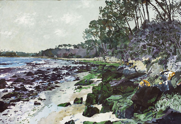 Rivière de Pont-l'Abbé